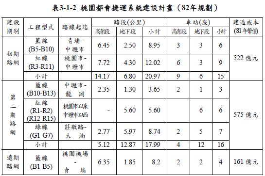 中文（台灣）: 表達台灣省政府住宅及都市發展局於1993年所規畫的桃園都會區大眾捷運系統分期的方案